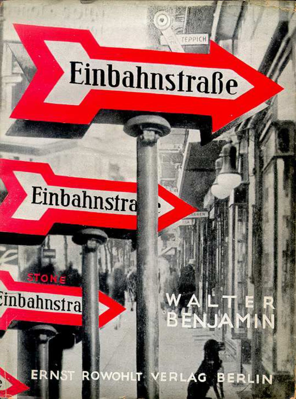 Walter Benjamin: Einbahnstraße, Ernst Rowohlt Verlag Berlin, 1928. 29,8 x 21 cm . Schutzumschlag/dust jacket von Sasha Stone